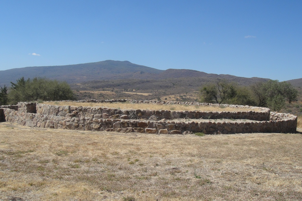 Template:Huandacareo, Main Structure, circular basement